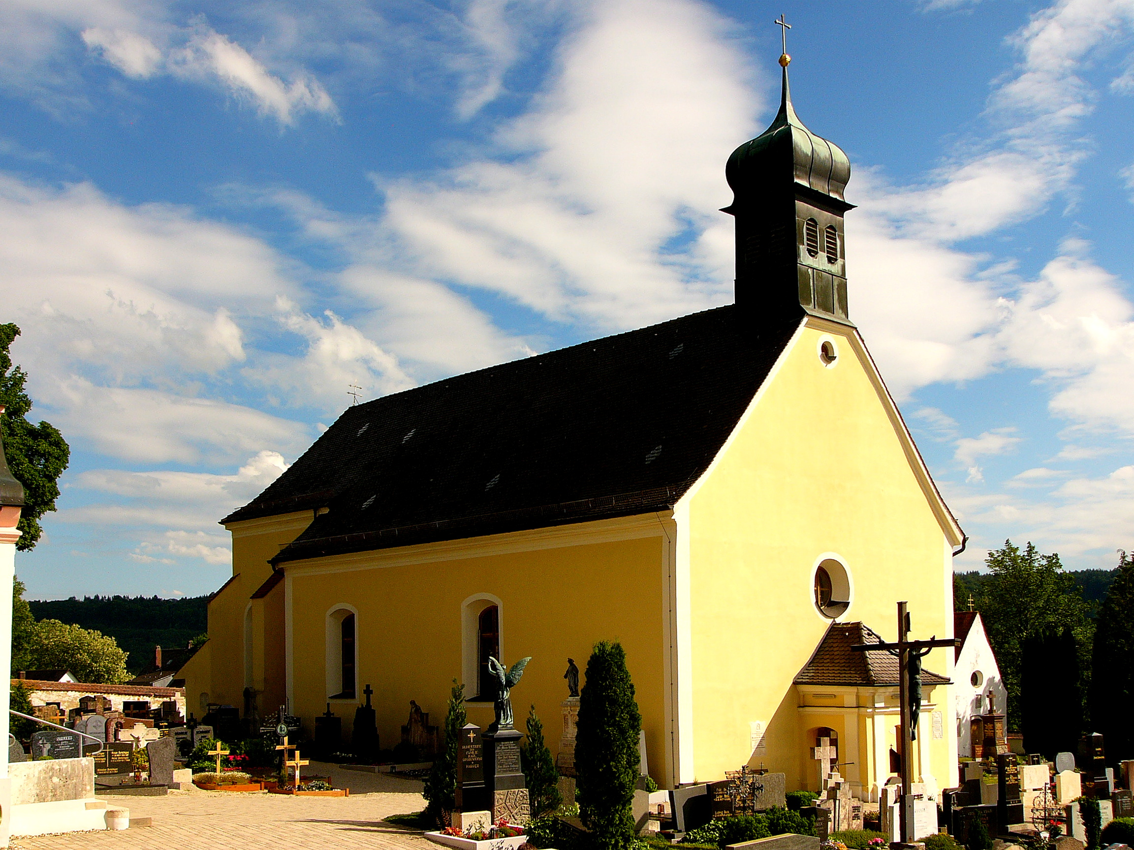 Katholische Gottesackerkirche St. Lucia (Bühlkirche); Saalbau mit Steildach, 1469-76, barockisiert und mit Dachreiter versehen, 1740; mit Ausstattung; Kapelle St. Johannes, 1496, im 18. Jahrhundert verändert, profaniert; Leichenhalle, neubarock, 1903/04, auf Grundlage der Stephanskapelle von 1501; Friedhof, wohl spätmittelalterliche Anlage mit Erweiterung, 19. Jahrhundert; Einfriedungsmauer, 1886; Grabdenkmäler in historisierenden Formen.This is a photograph of an architectural monument.